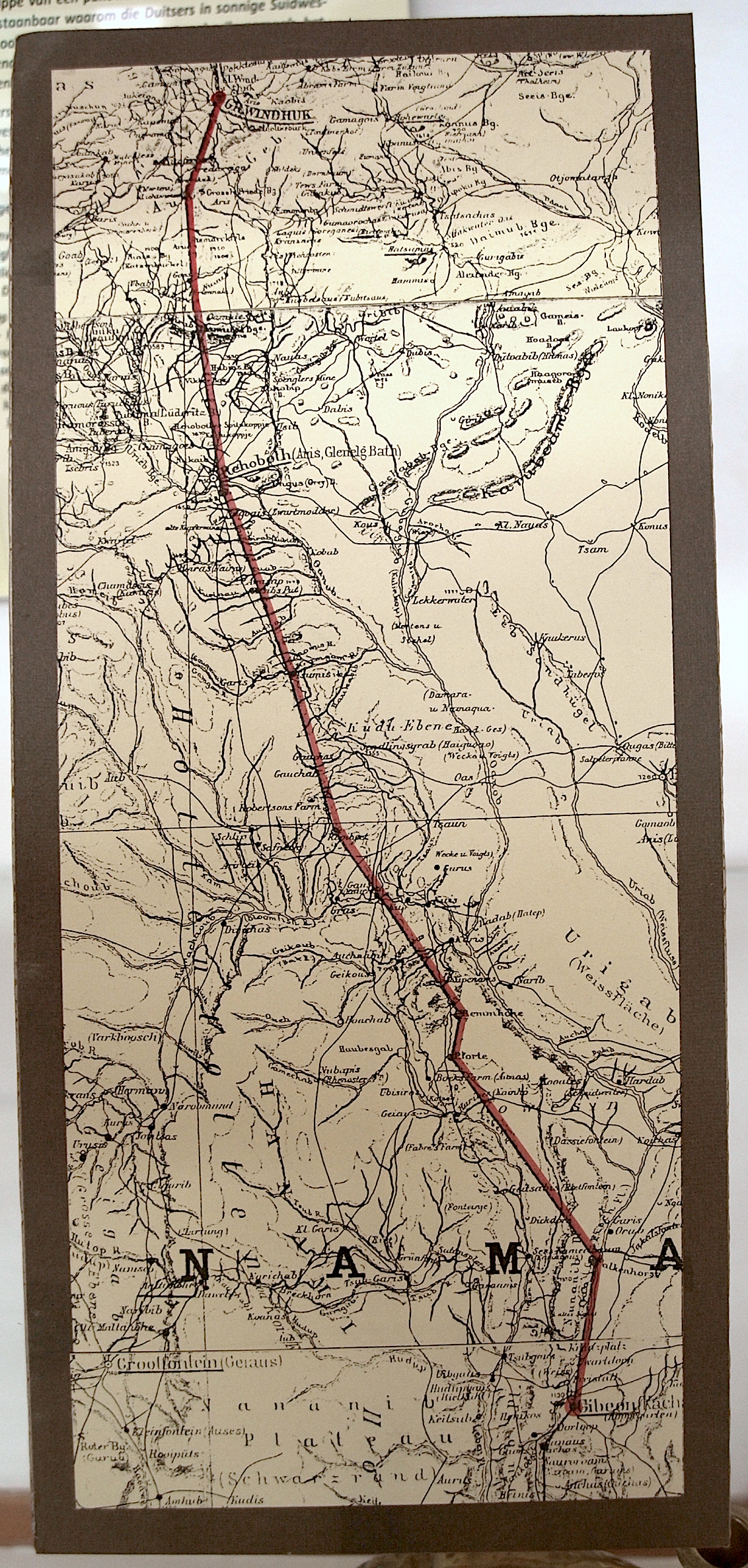 Fotografie der Heliotelegraphiestrecke Windheok - Gibeon im Museum Swakopmund